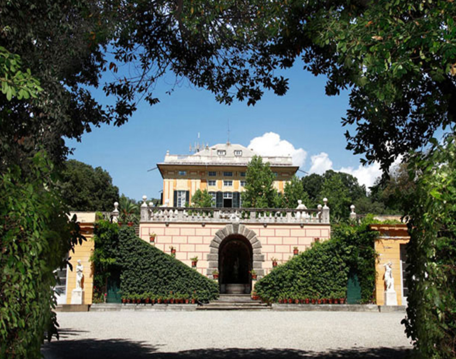 Villa Gropallo dello Zerbino Genova